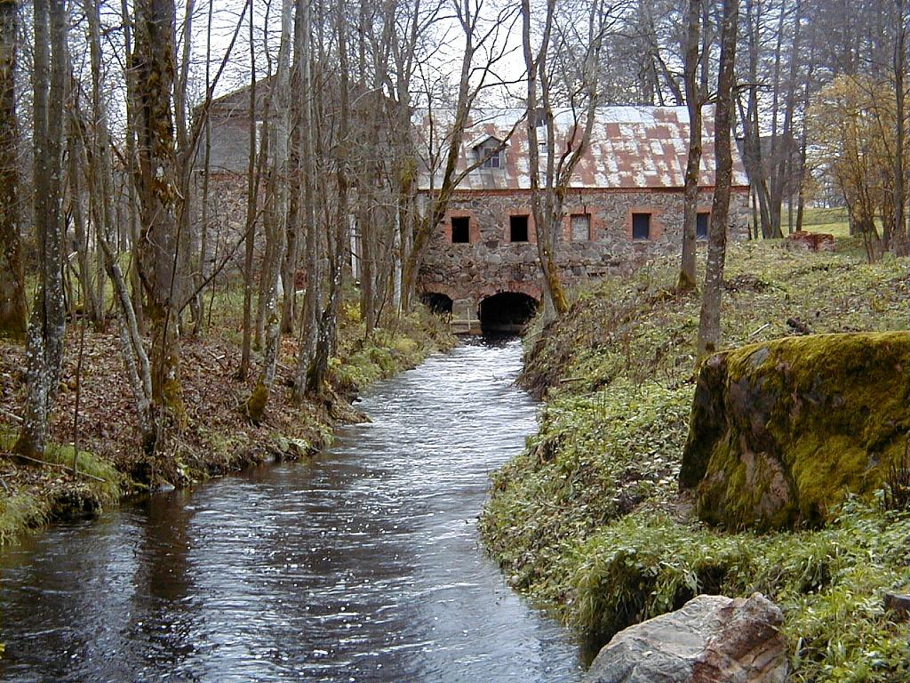 Dienvidsusēja River near Gārsene, Latvia